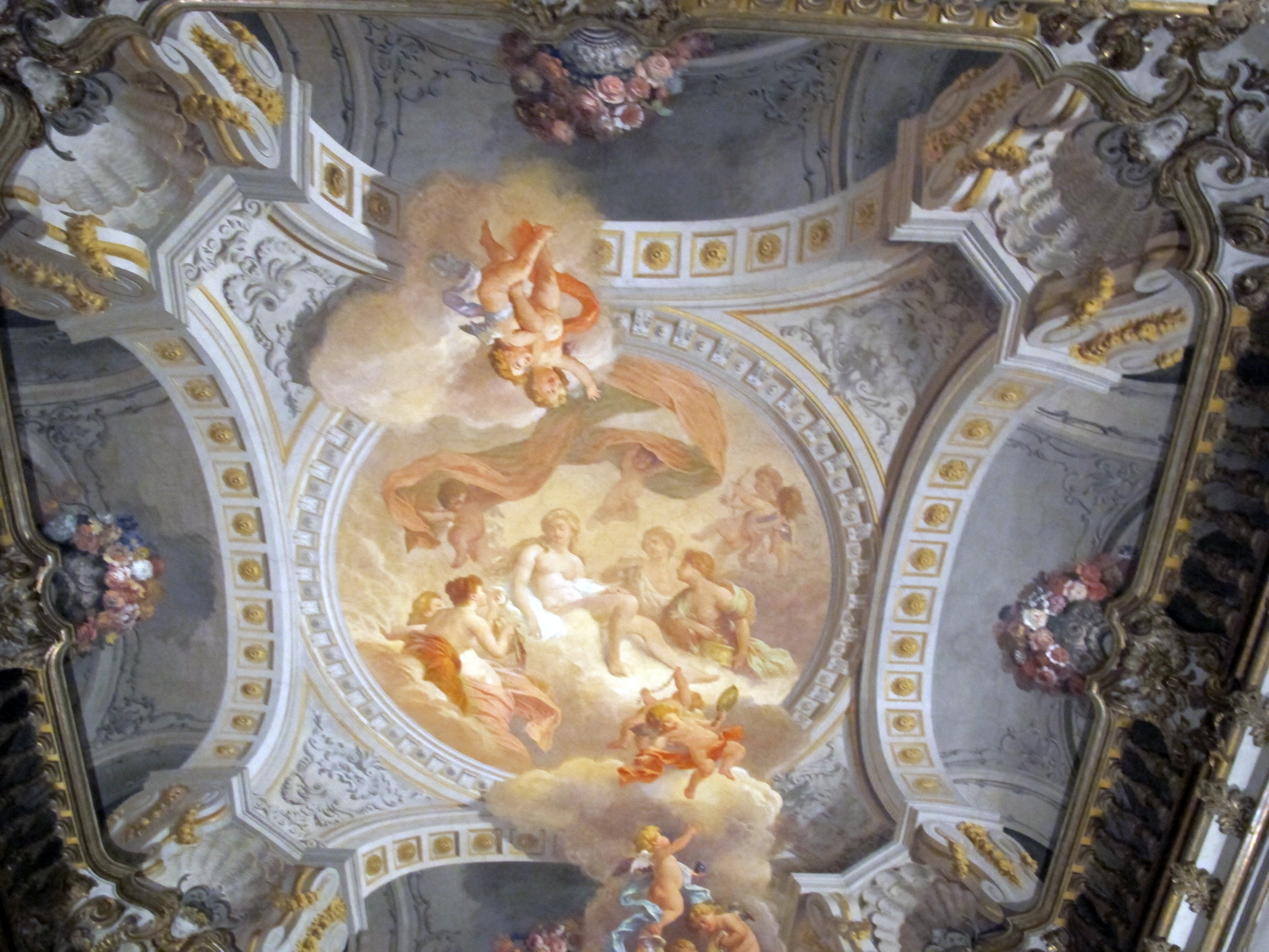 Palazzo brancaccio, alcova